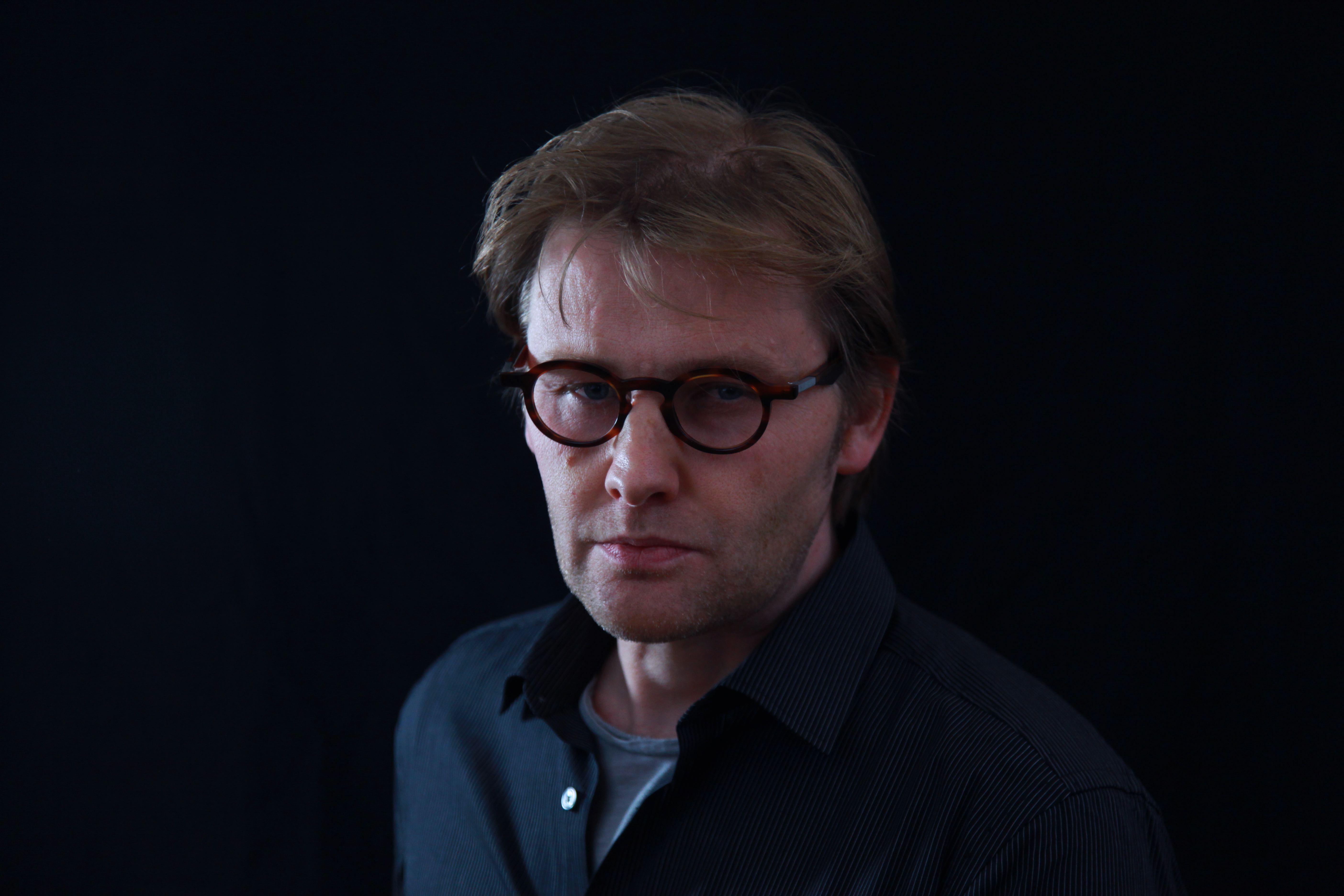 Christian Schittenhelm